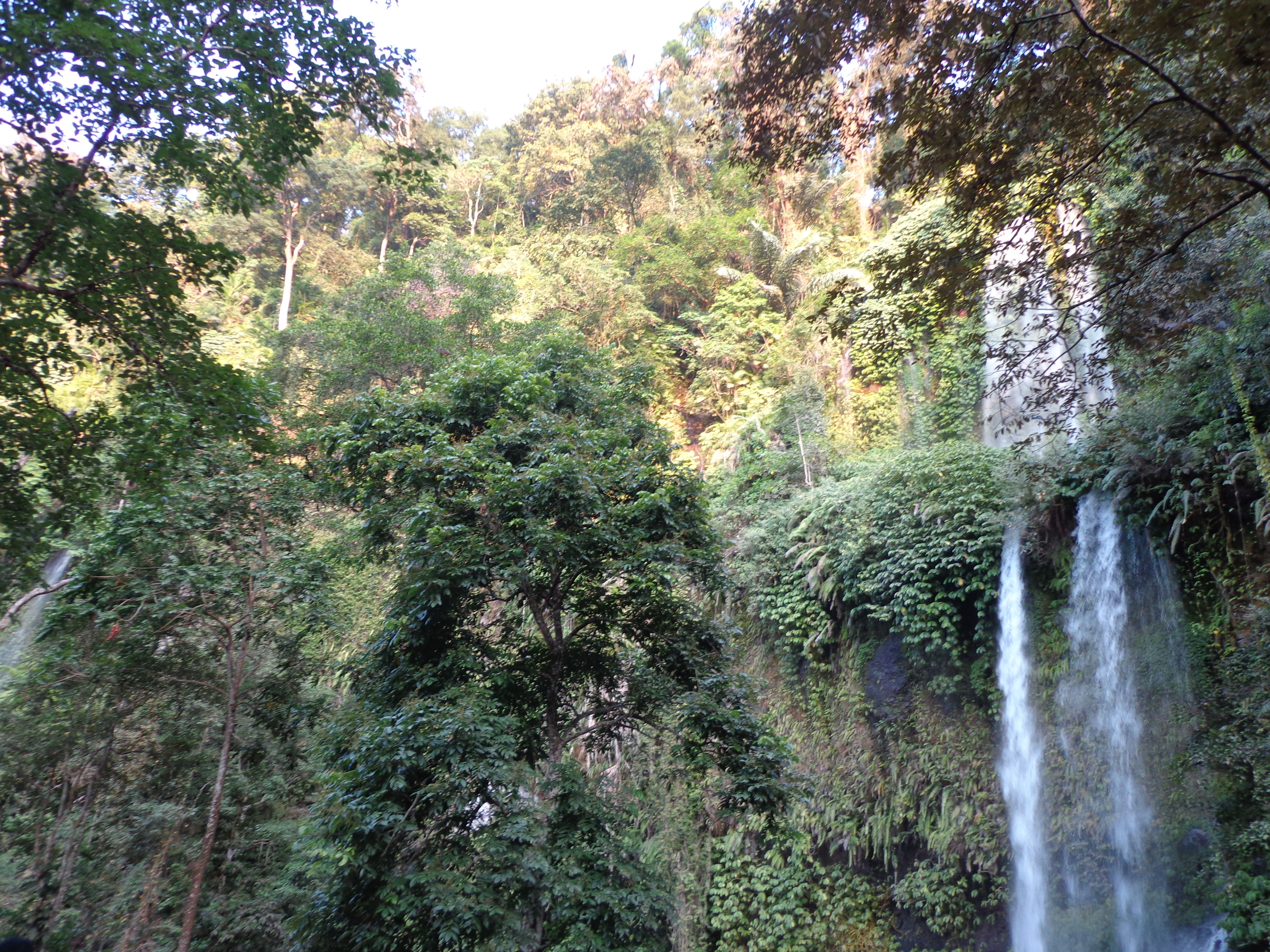 Air Terjun Sendhang Gile Lombok